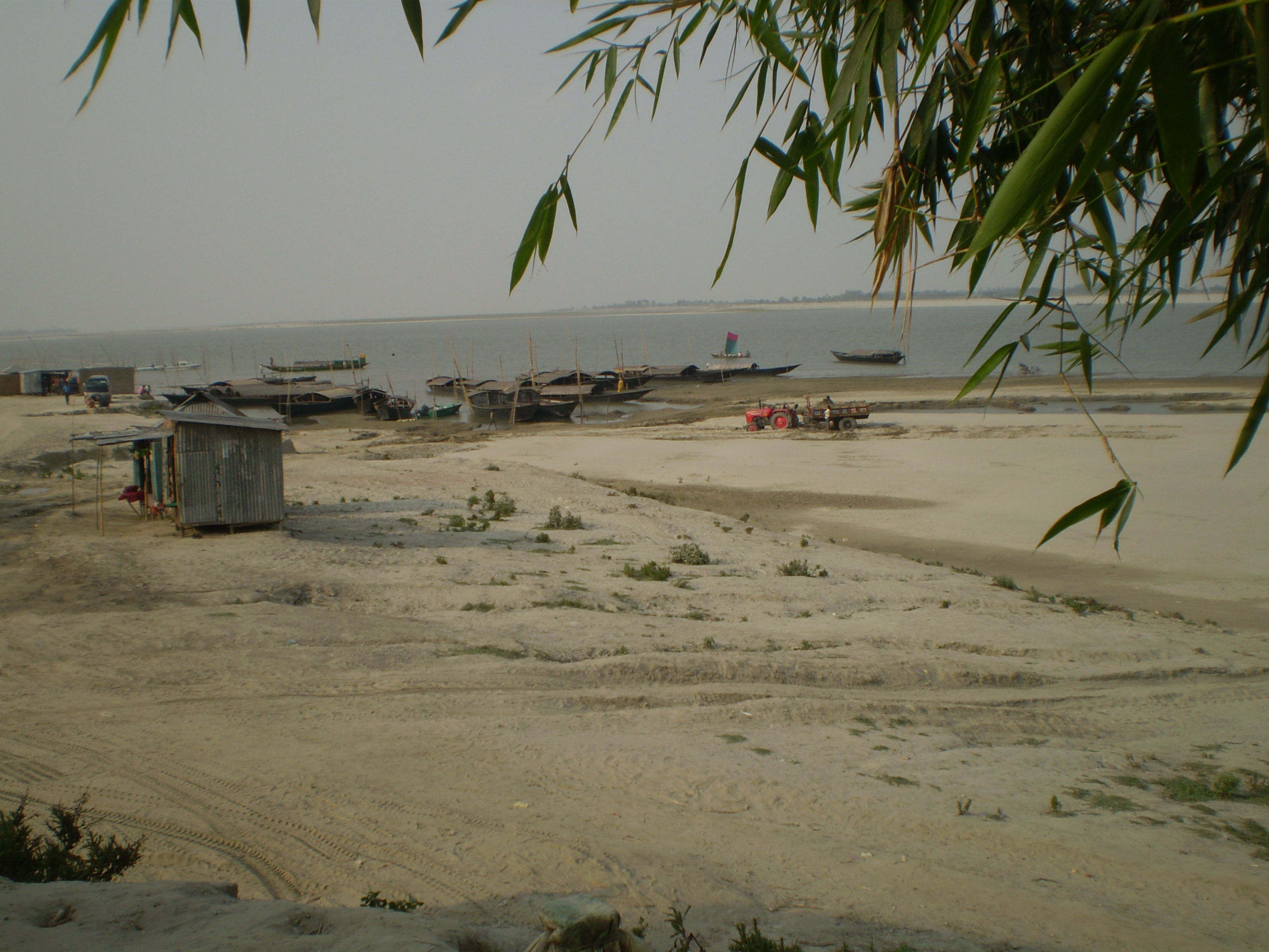 Brahmaputra River dried up